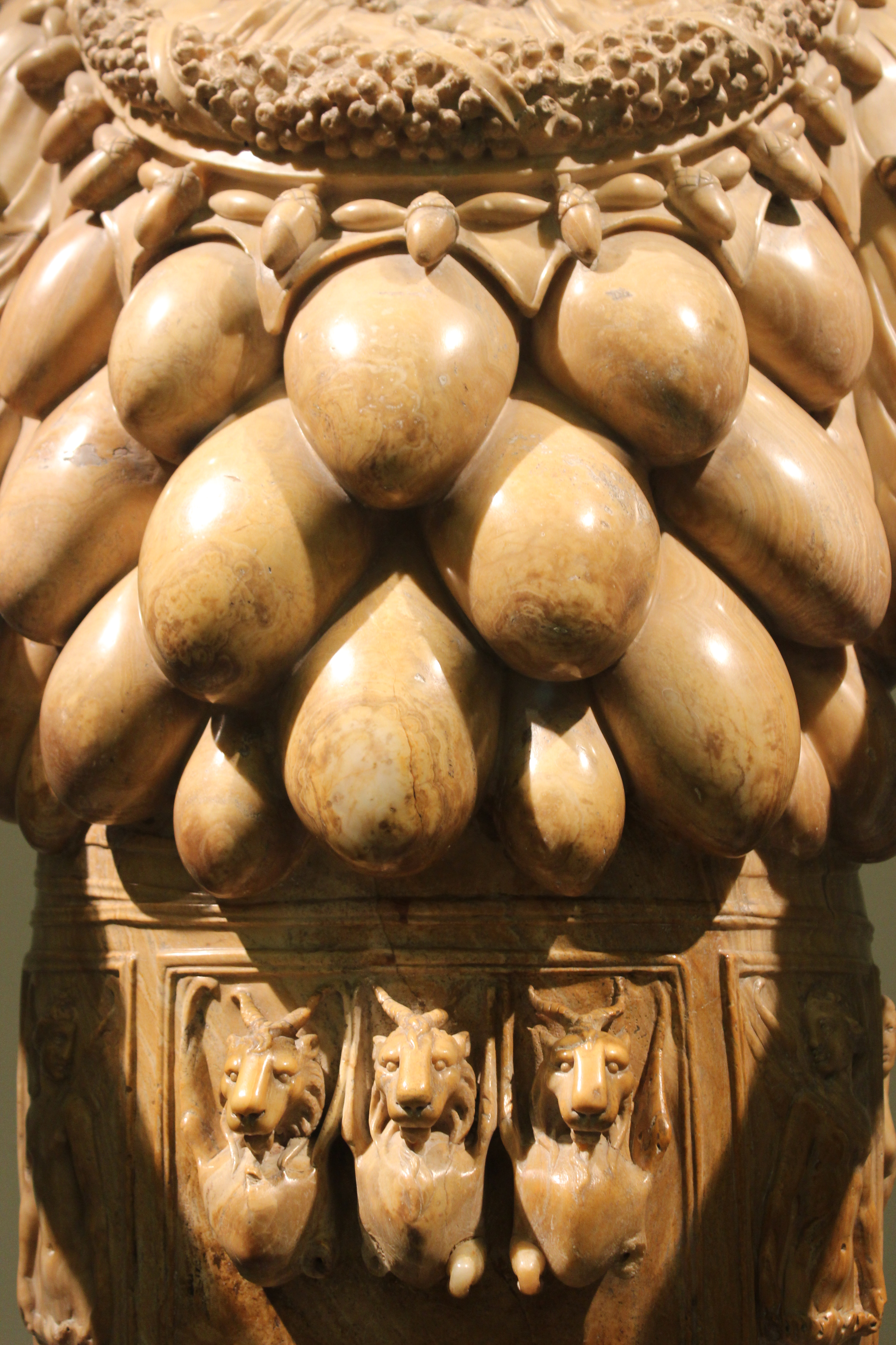 Ártemis de Éfeso. Nápoles, Museo Arqueológico Nacional.